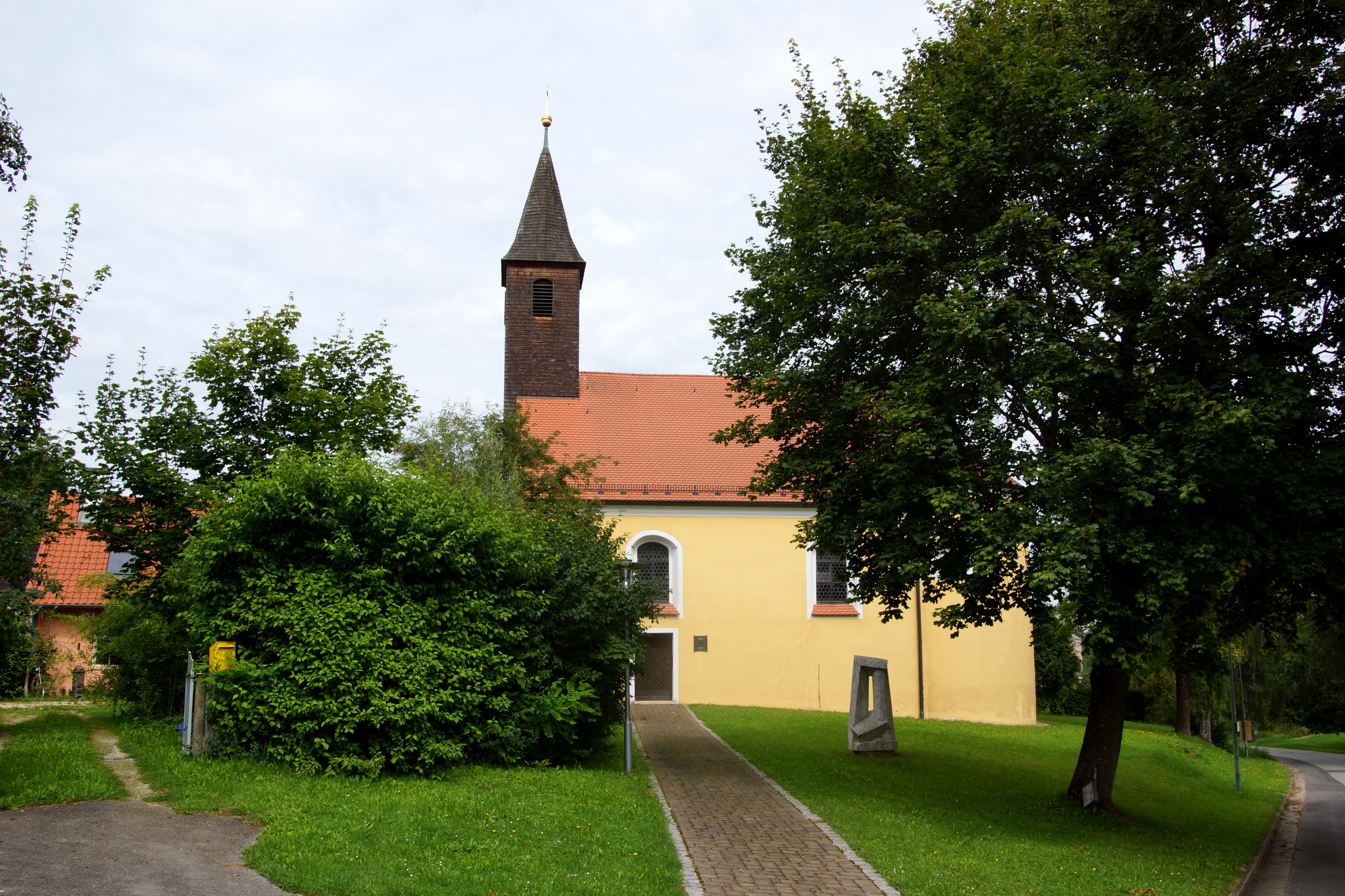 Die katholische Filialkirche St. Thekla in Mausheim bei Beratzhausen in der Oberpfalz